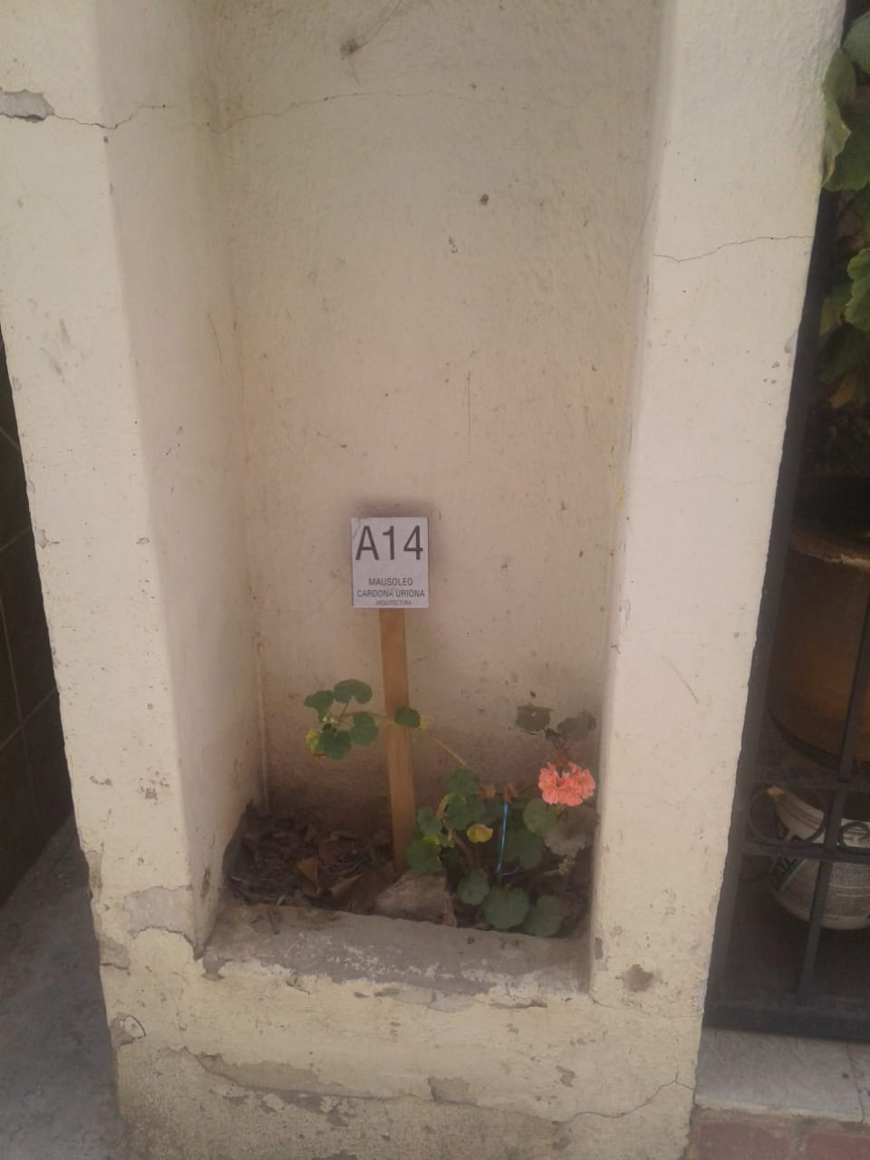 nombre de como ubicarlo